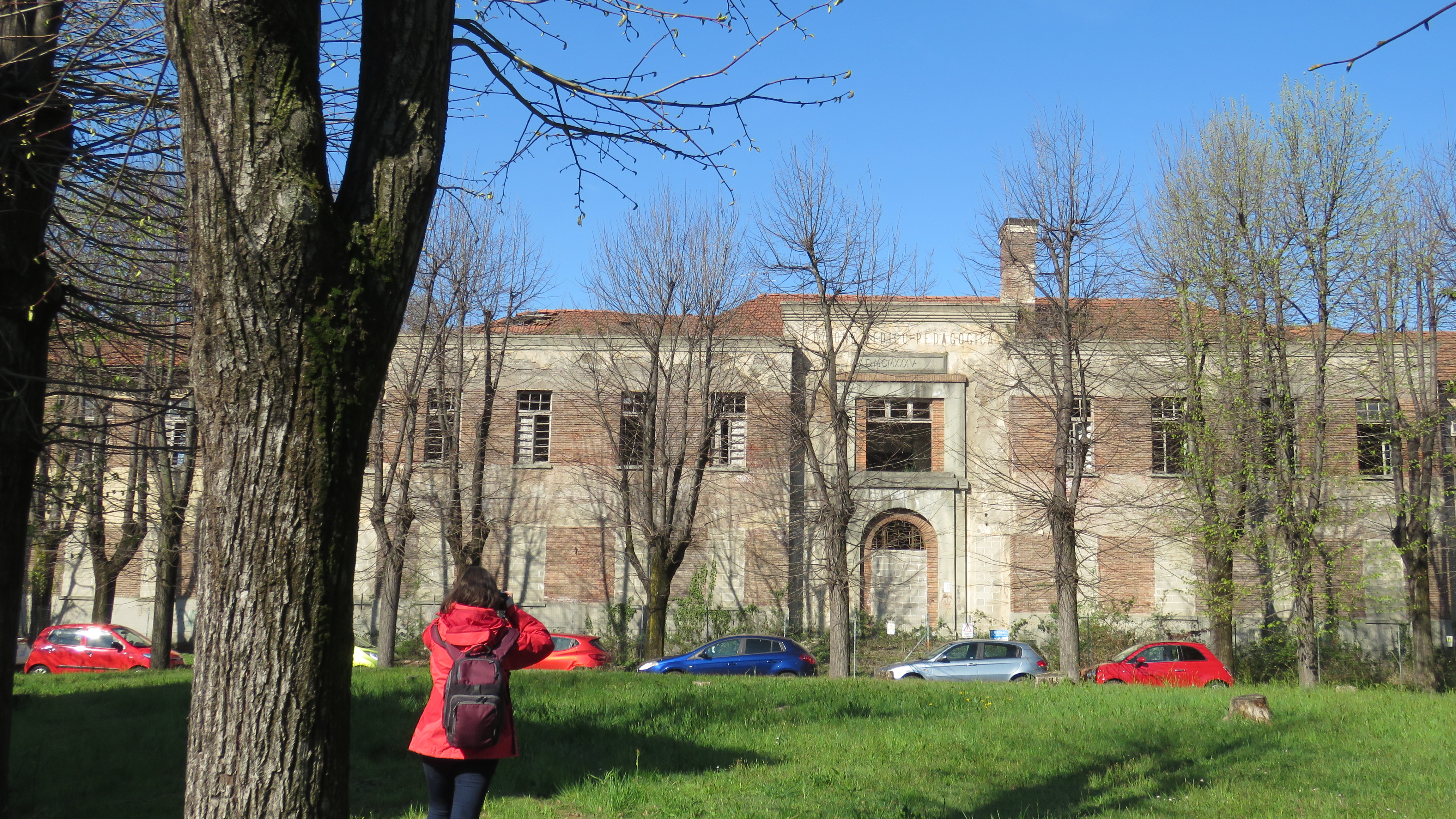 הקמפוס בגרוליאסקו